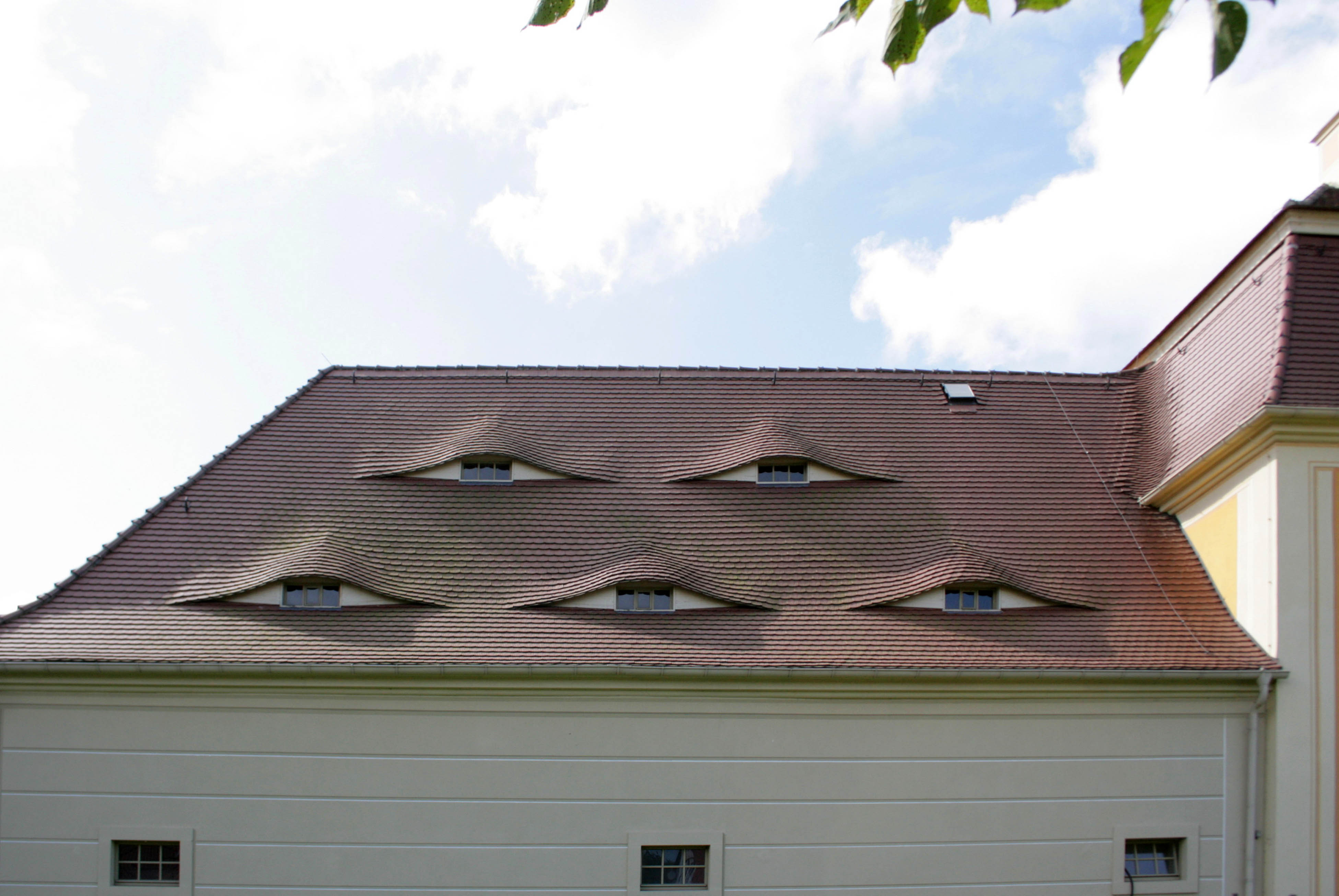 Barockschloss Rammenau in Rammenau